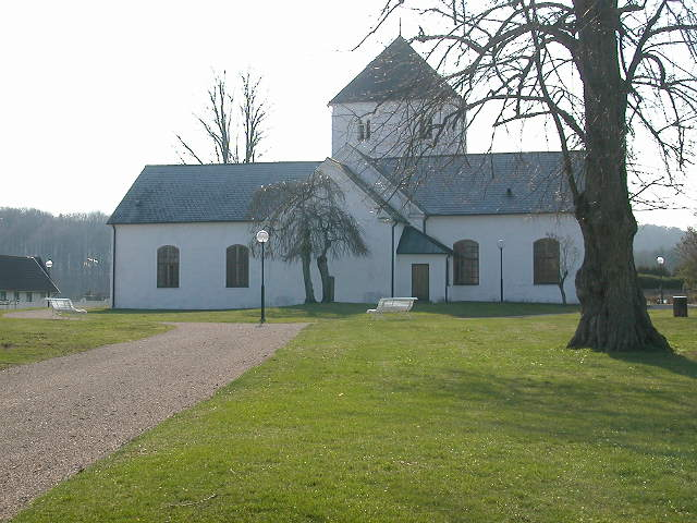 Östra Sönnarslöv kyrka